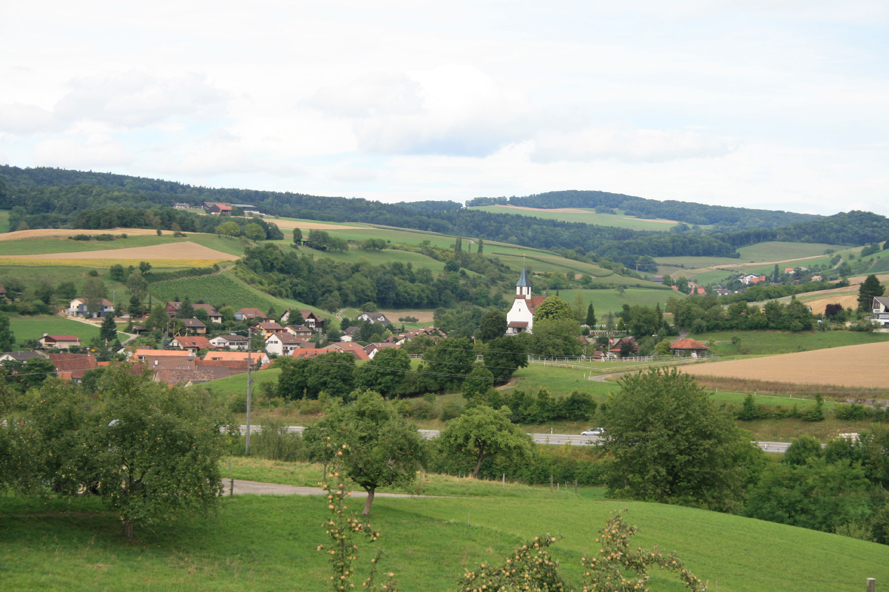 Bözen AG, Schweiz